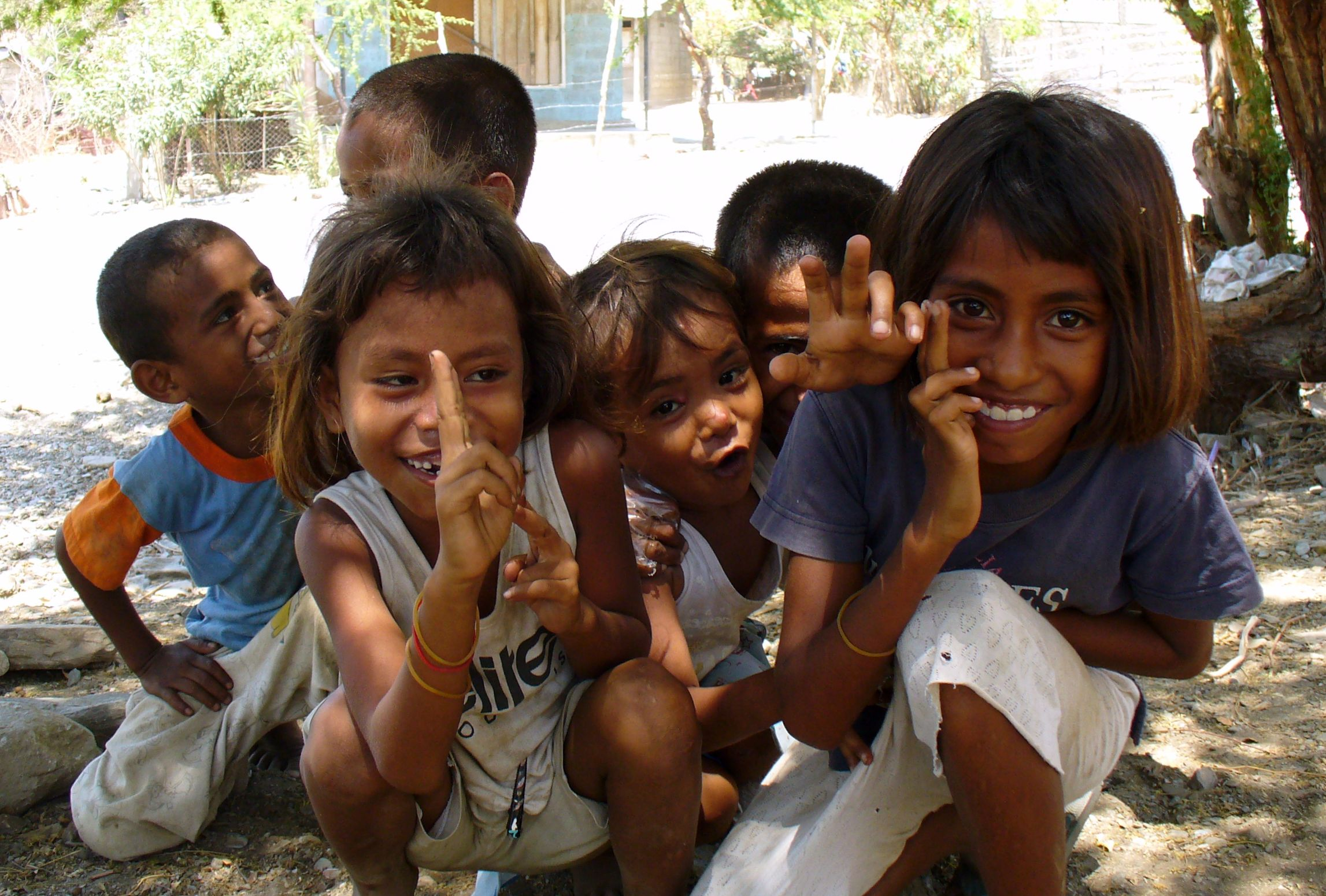 Dili, East Timor